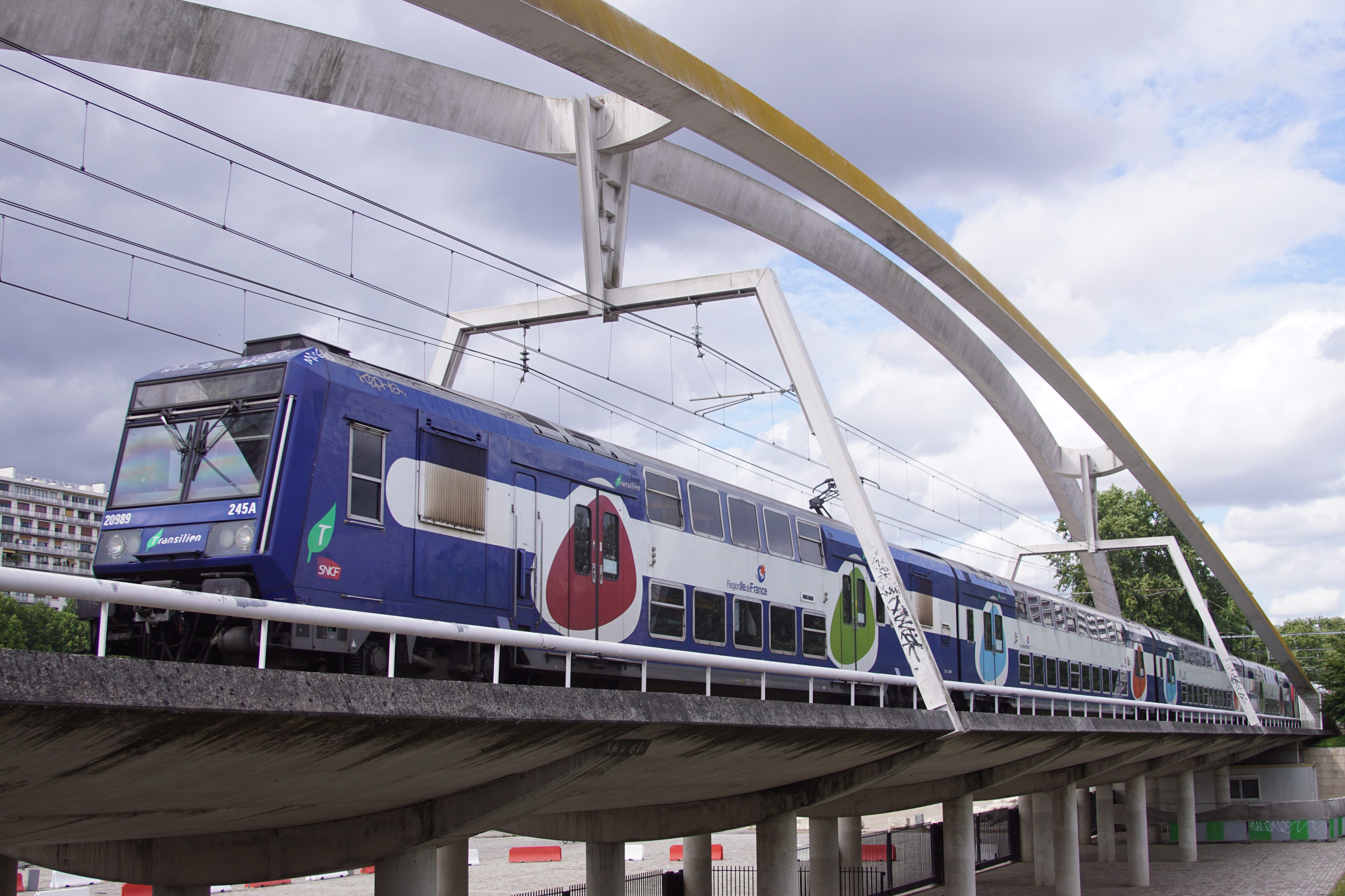 Une unité multiple avec une Z 20900 en tête traverse le viaduc au-dessus du parc André Citroën.